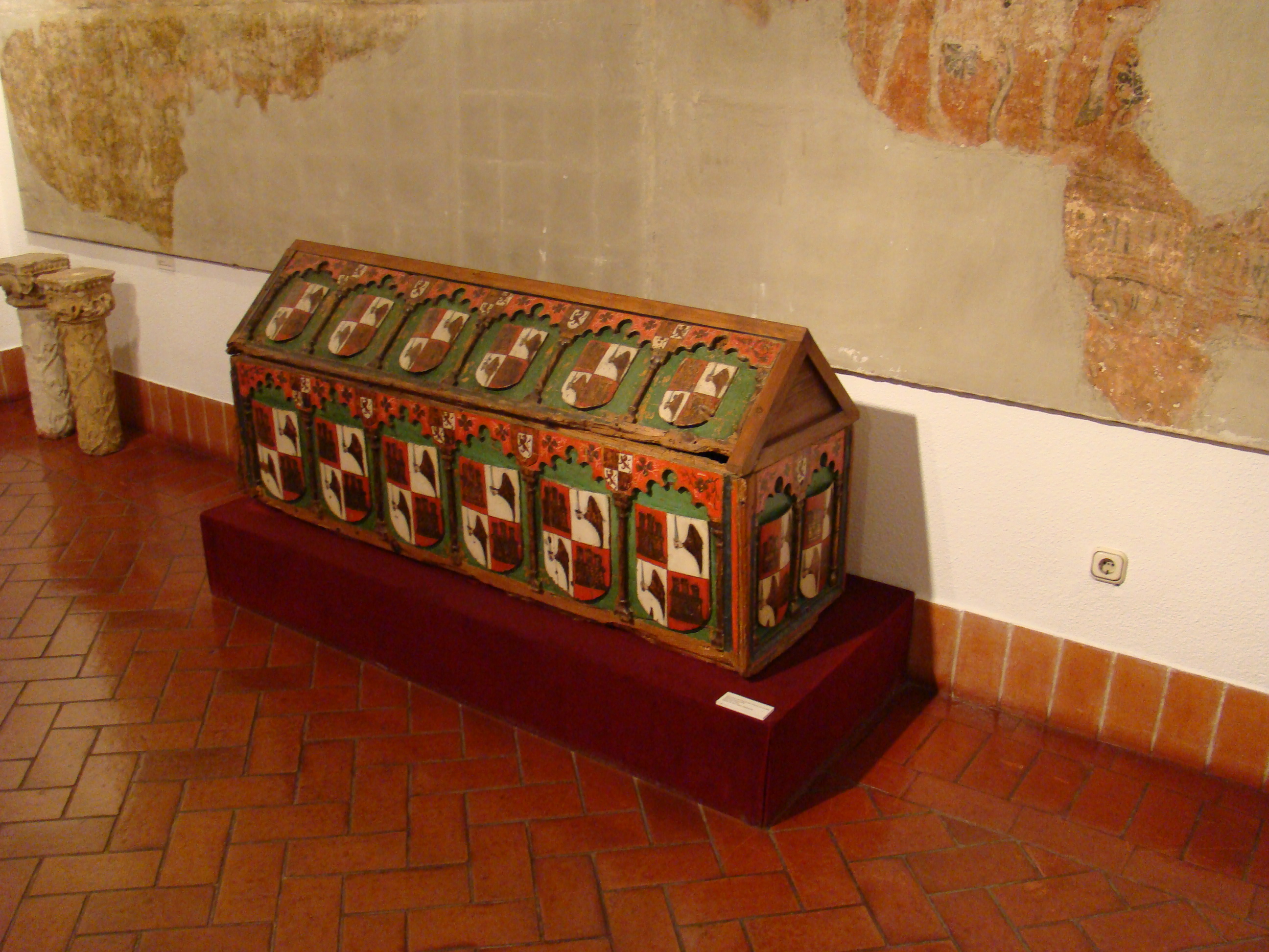 Museo de Valladolid. Ataúd de madera que contuvo los restos del infante Alfonso de Castilla (1286-1291), que fue hijo de Sancho IV el Bravo, rey de Castilla y León, y de la reina María de Molina. Está adornado con unos escudos parecidos al del célebre escritor y magnate Don Juan Manuel, que fue nieto de Fernando III el Santo. El infante Alfonso nació en 1286 y falleció en 1291, a los cinco años de edad, y fue sepultado en el convento de San Pablo de Valladolid, de la Orden de los dominicos.